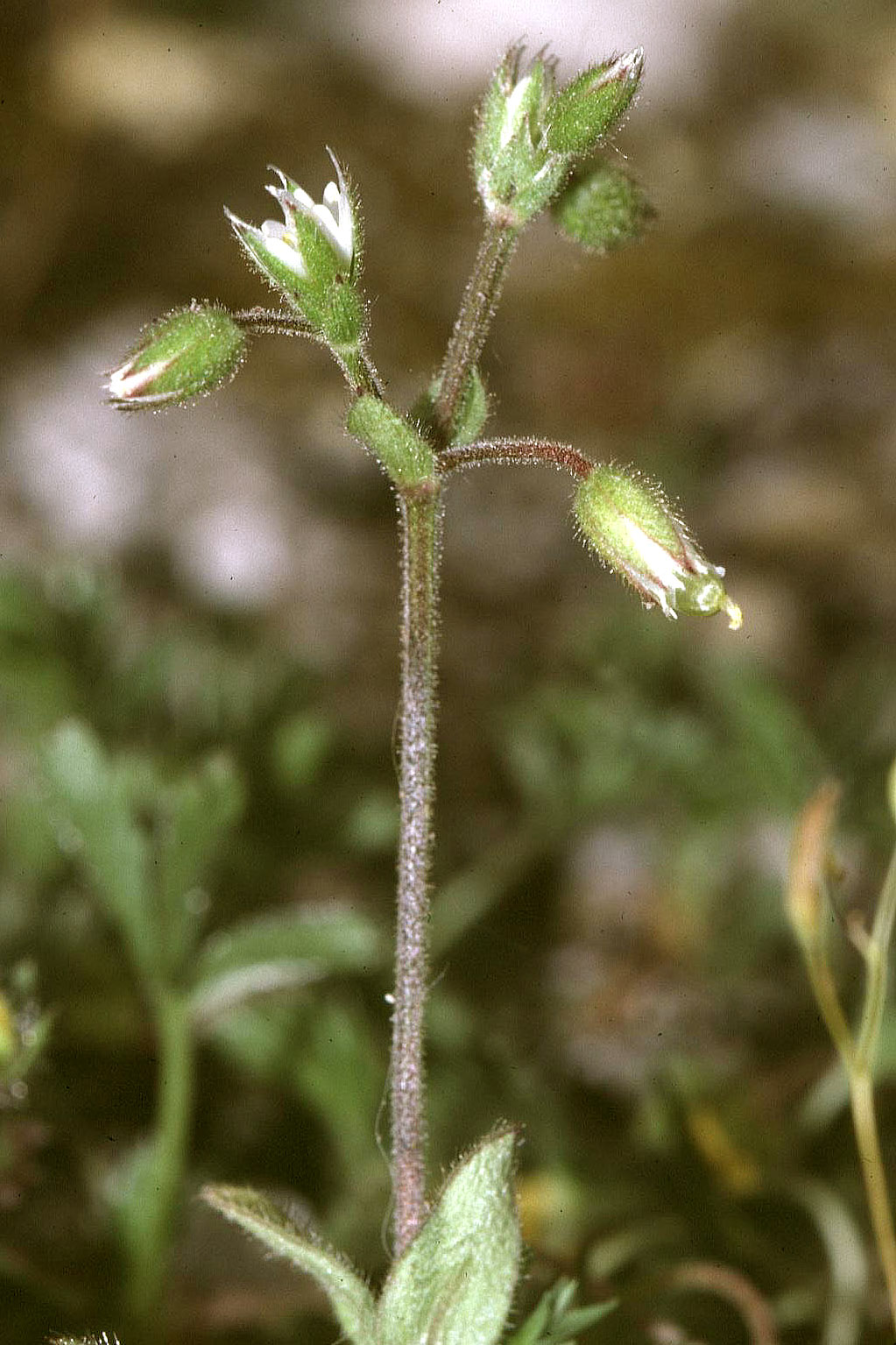 Cerastium pumilum(Unterfranken, Germany)